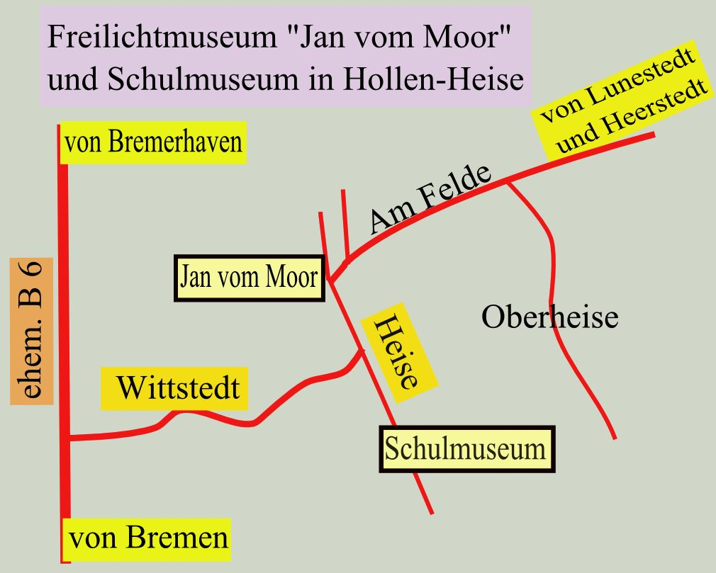 Lage der Hollener Museen "Jan vom Moor" und "Schulmuseum"